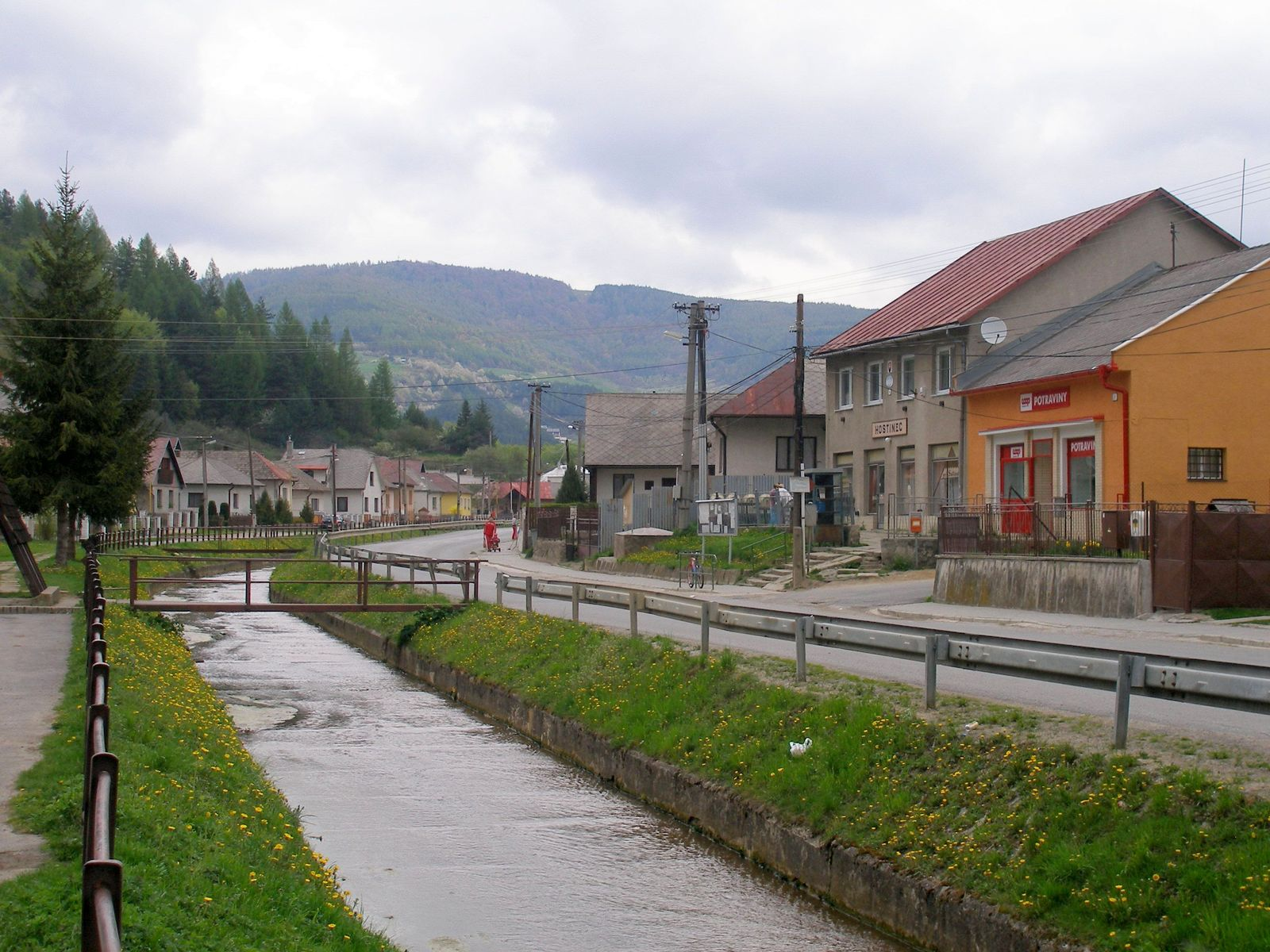 Obec Šindliar okres Prešov región Šariš